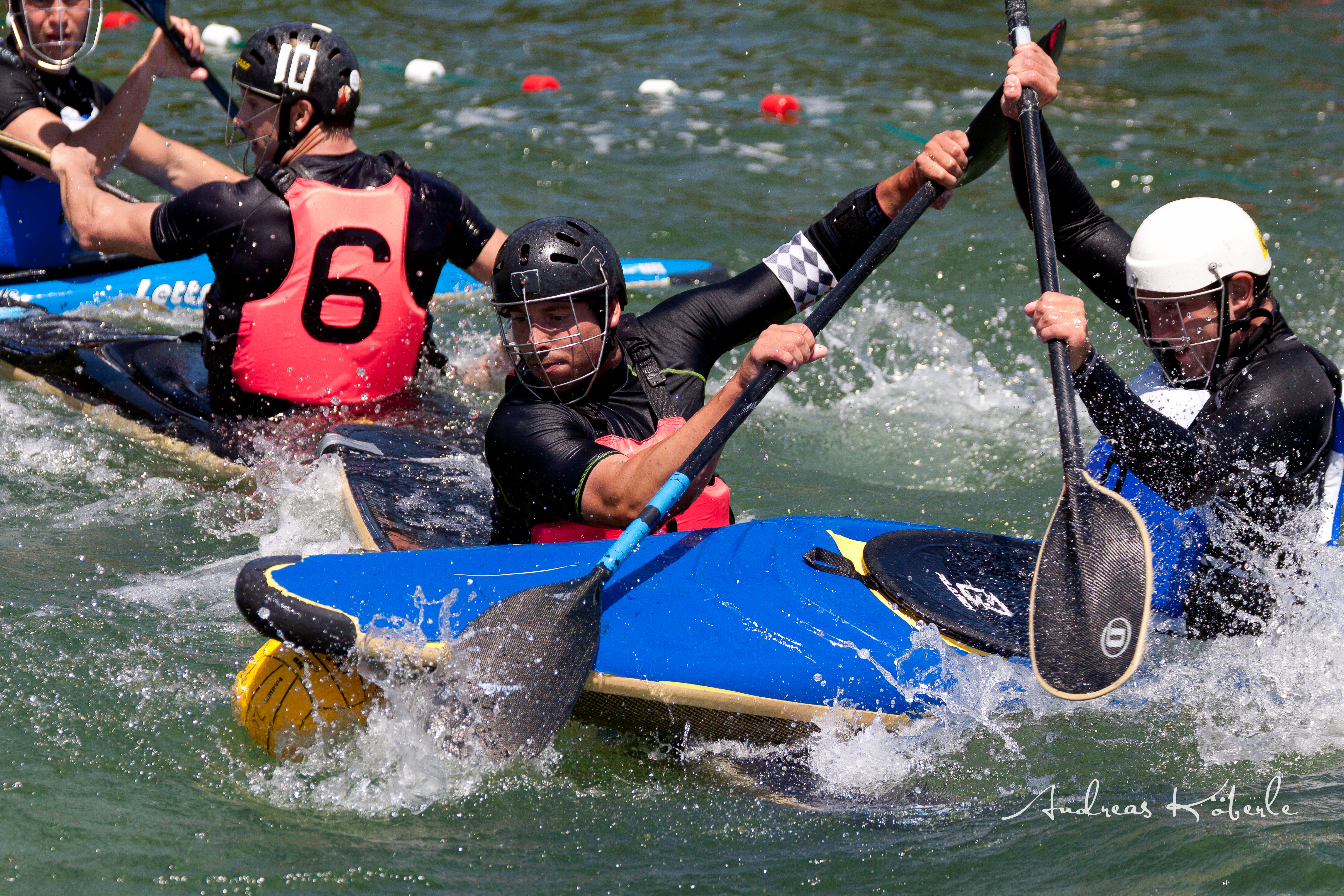 Radolfzell Bodensee Kanupolo